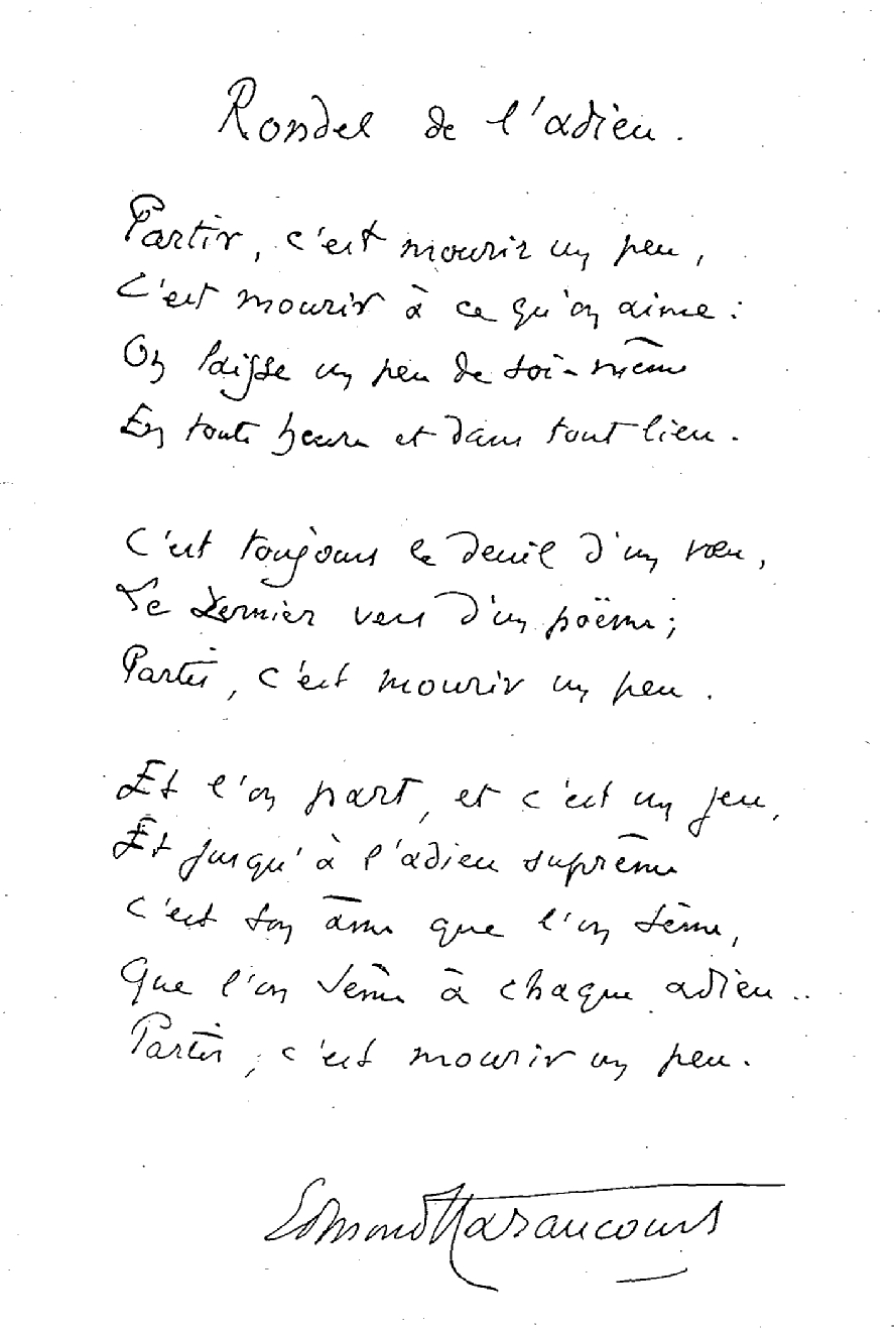 Le Rondel de l'adieu par Edmond Haraucourt, paru pour la première fois dans Seul, roman en vers, en 1890.